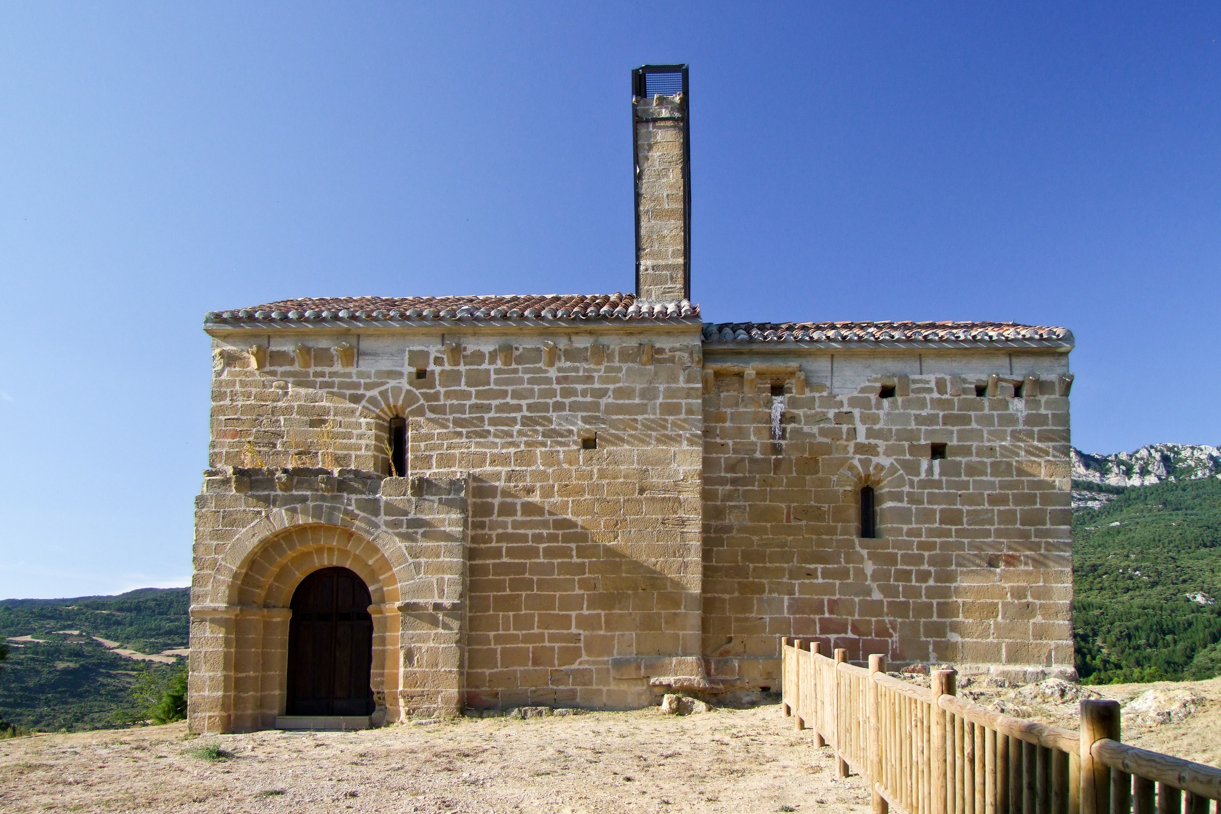 Ermita de San Felices en la localidad de Ábalos, La Rioja - España